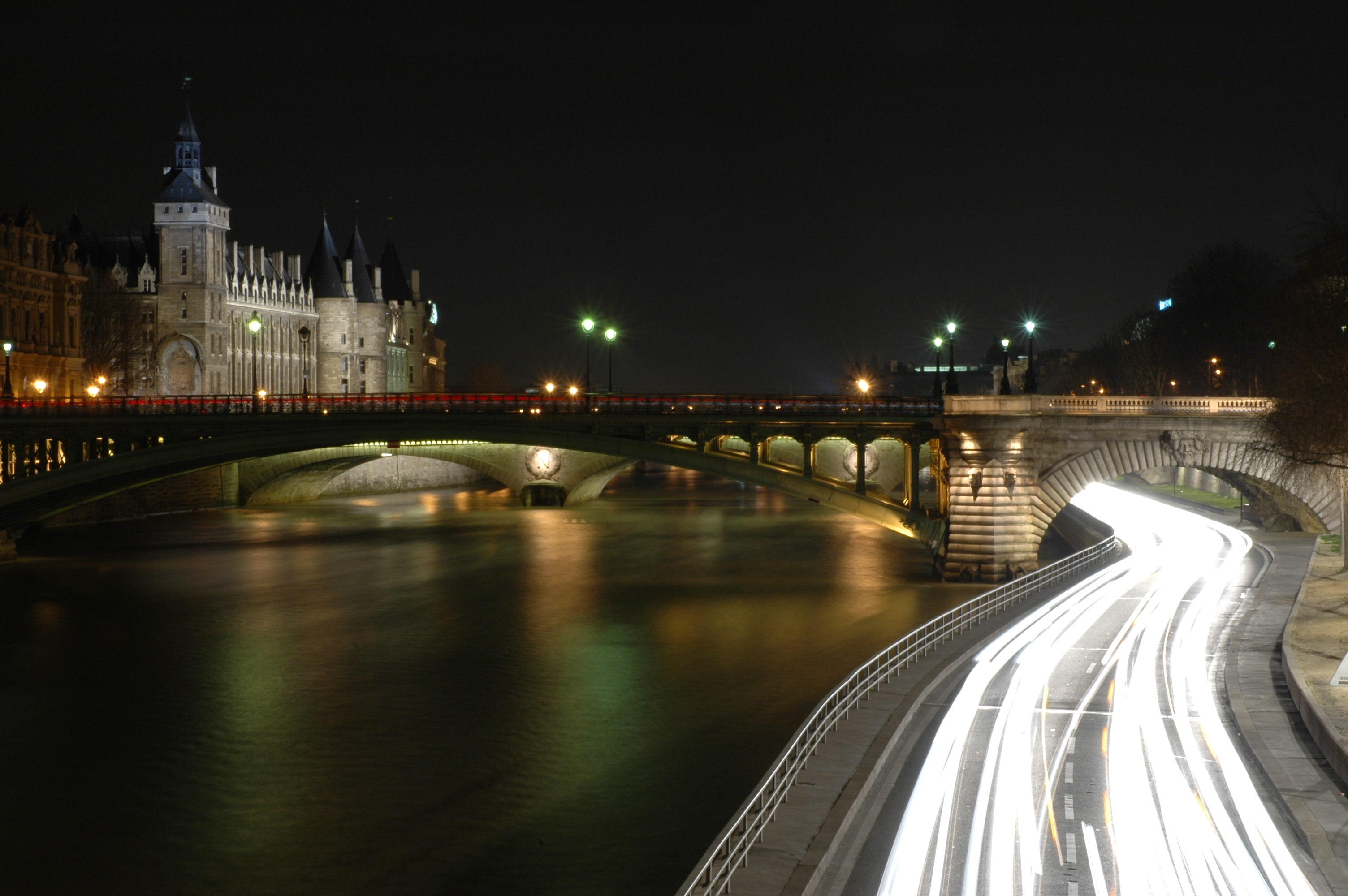 Exposure 20 seconds En 20 secondes l'eau de la Seine est nivelée et des voitures seuls la traînée des phares est visibles La Tour de l'Horloge et la Conciergerie sur la gauche.